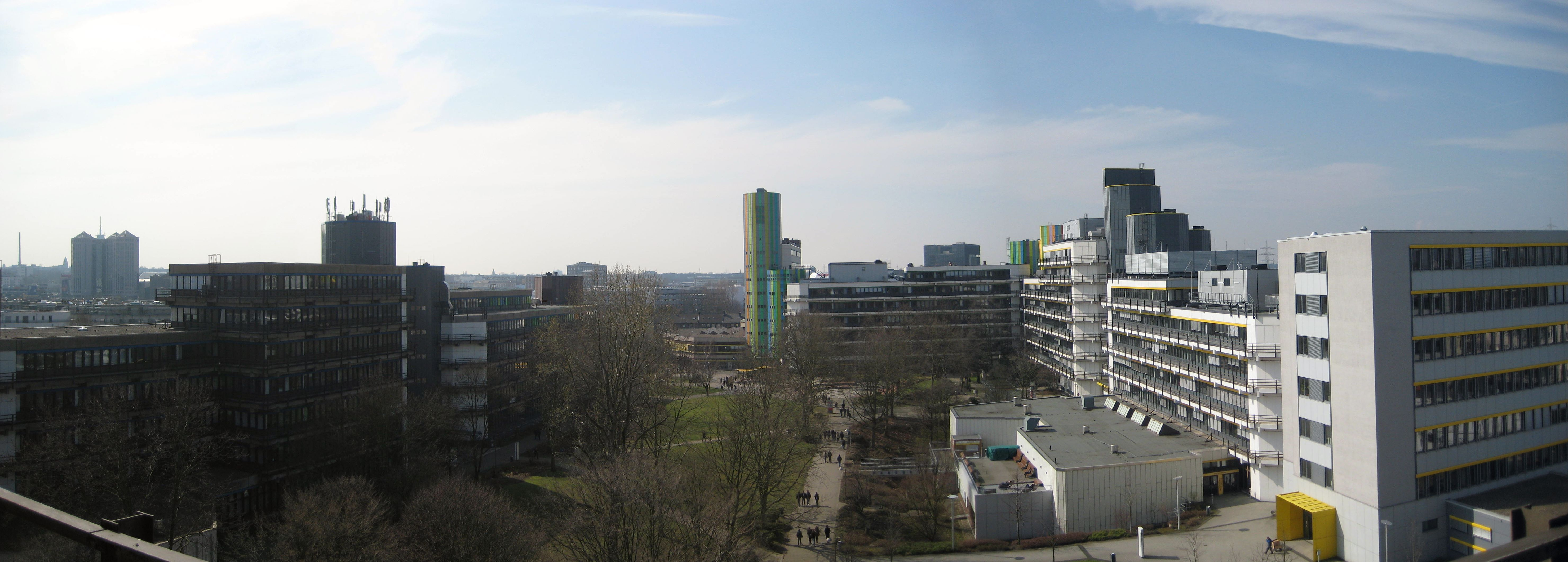 Panorama auf den Essener Campus - Universität Duisburg-Essen - Aufgenommen von R11